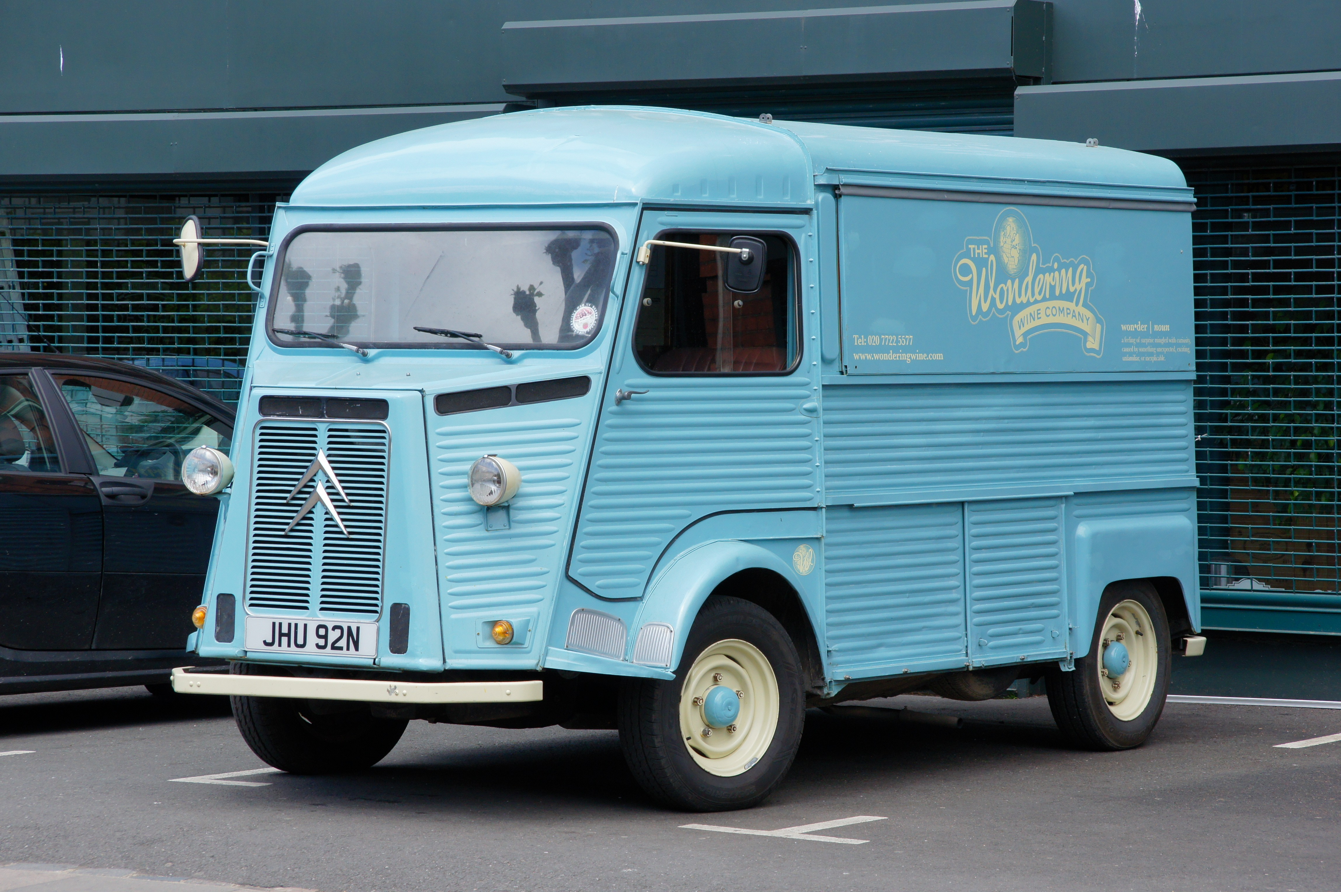 JHU92N-1 080613 CPS